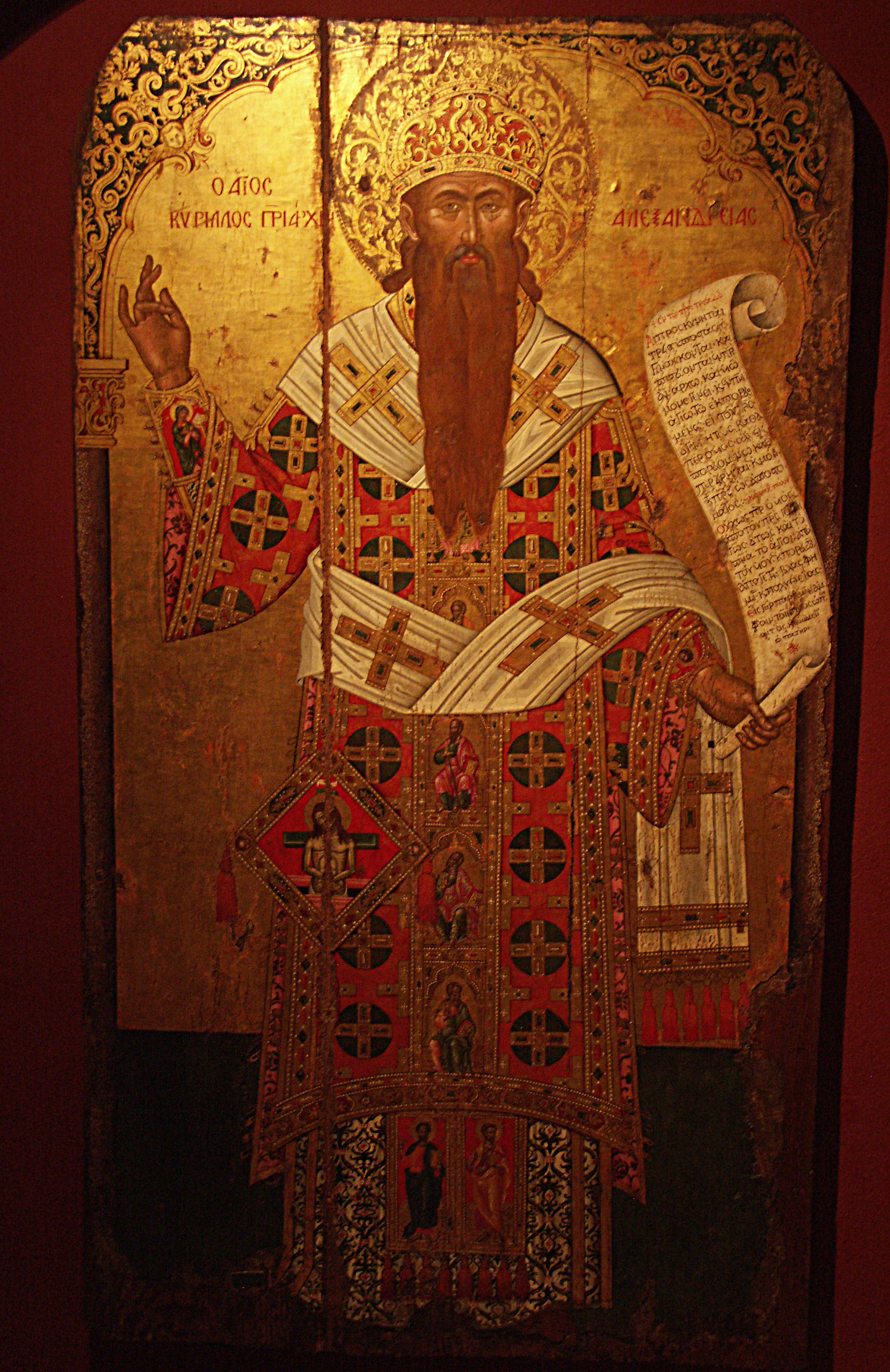 Tempera à l'oeuf sur bois (1654) de Tzanes (1610 - 1690), peintre d'icônes crétois émigré pour fuir la menace turque.